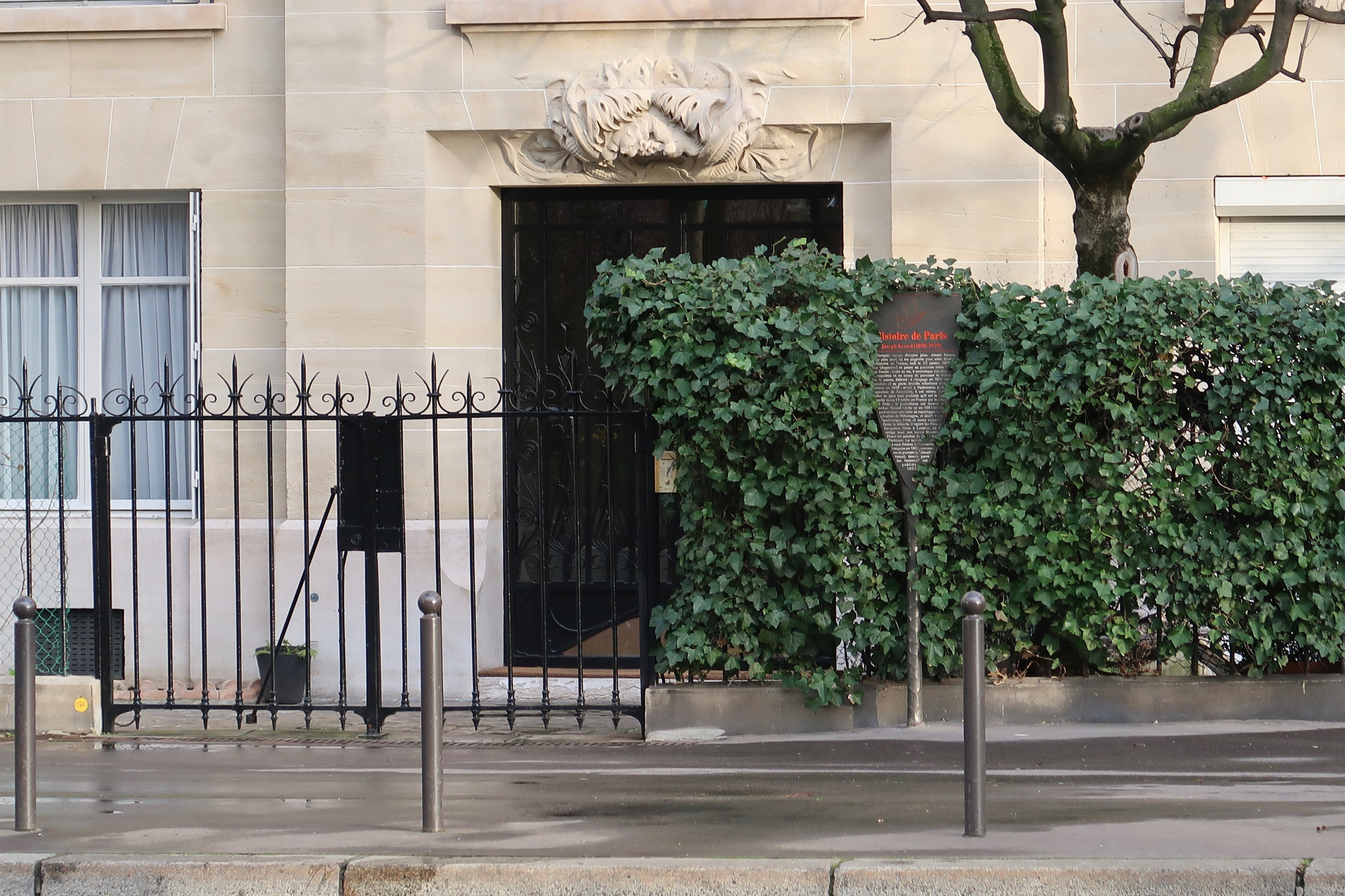 Immeuble où vécut l'écrivain Joseph Kessel, 15 boulevard Lannes (Paris, 16e). Présence d'un panneau Histoire de Paris.